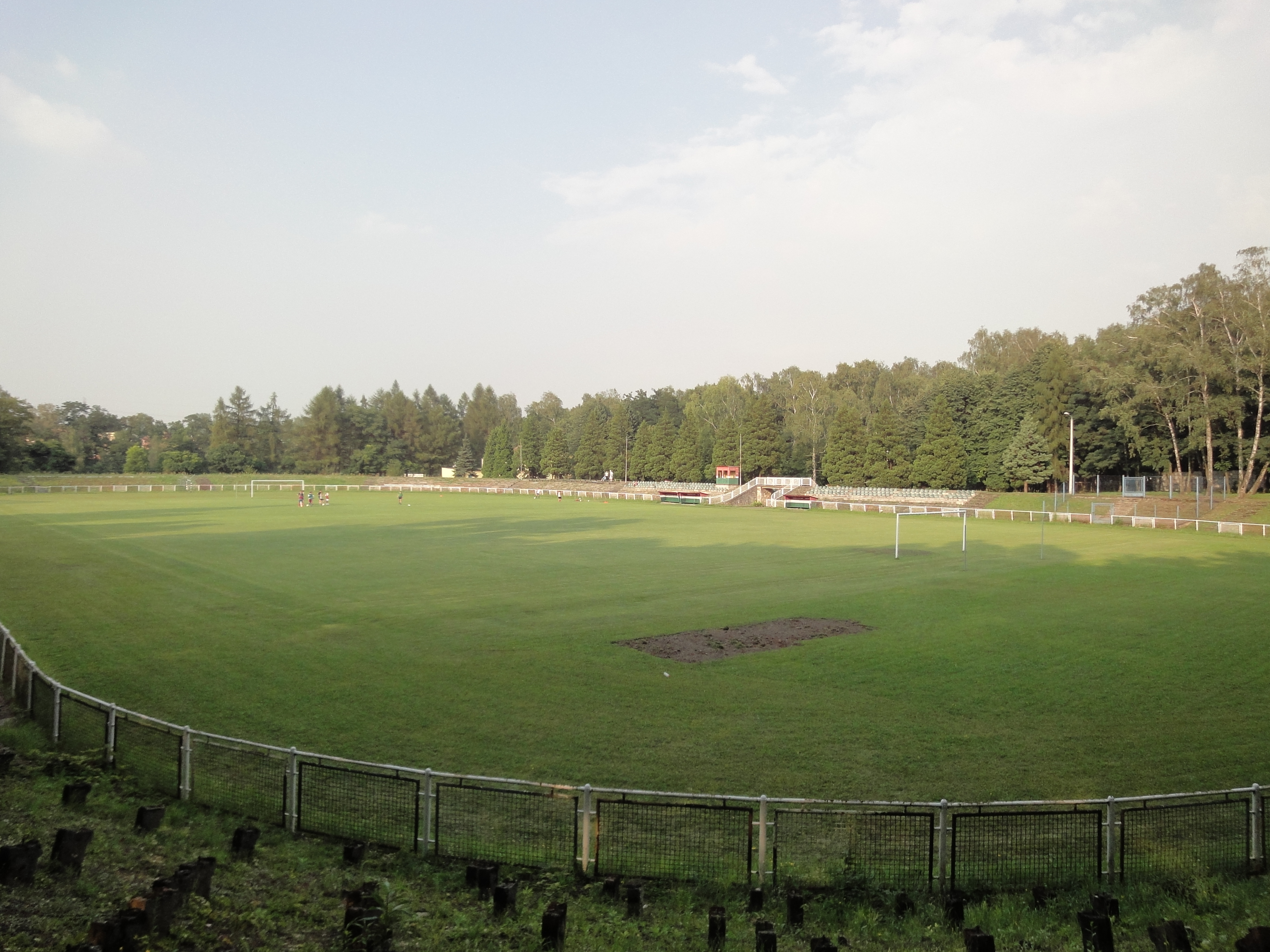 Zdjęcie przedstawia stadion miejski w Wojkowicach